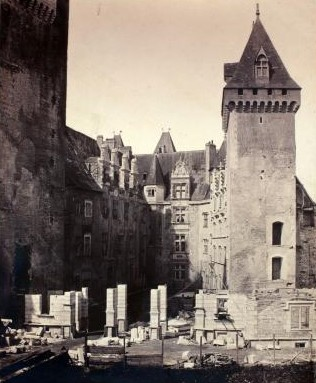 Photographie montrant le château de Pau vu de l'Est avec le portique en cours de construction.